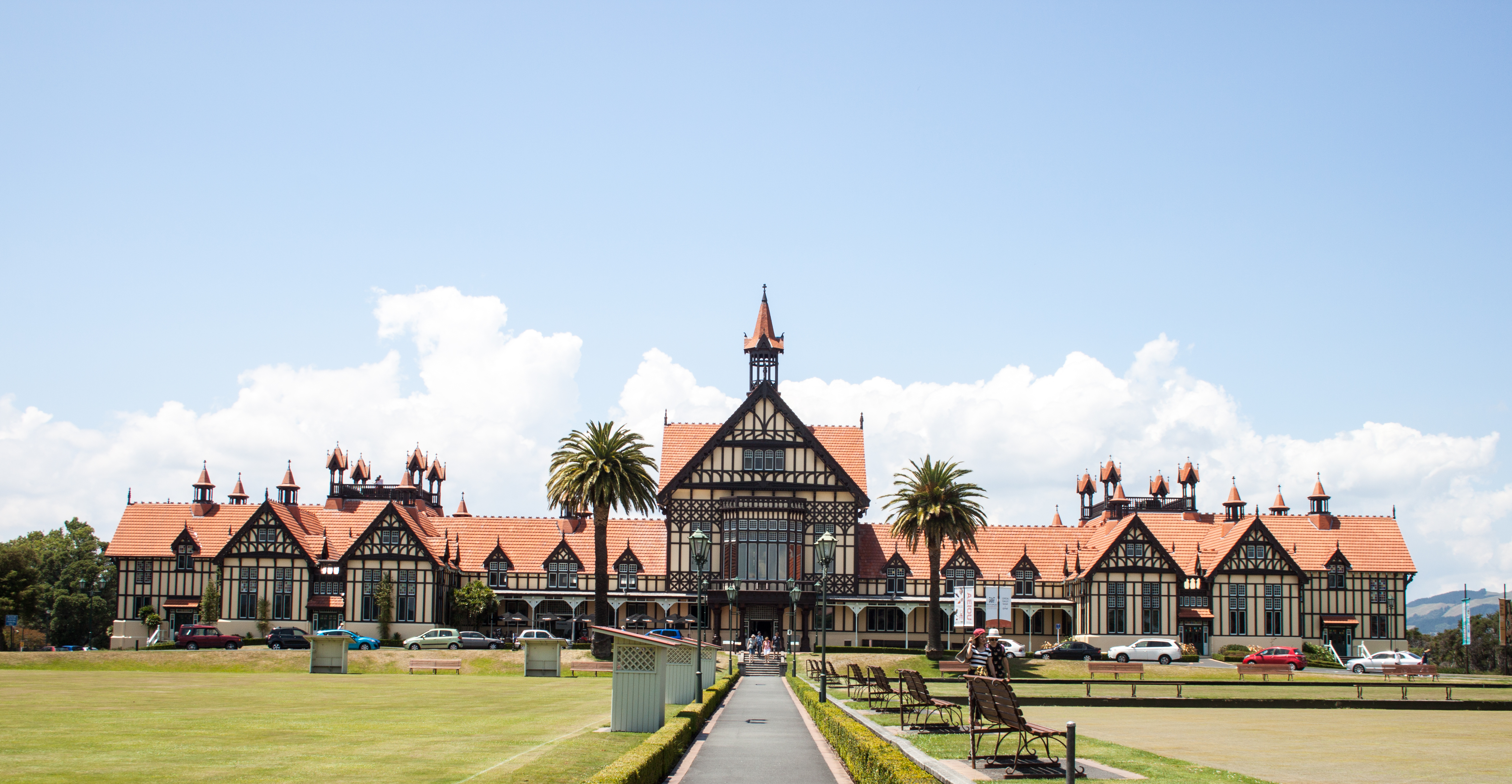 Rotorua Museum